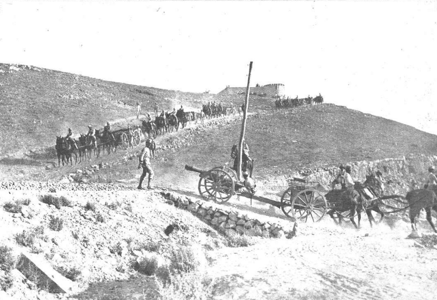 Una batería de campaña de cañones de tiro råpido Schneider 75/28 modelo 1906 del Ejército español, al mando del capitán Trujillo, practica el transporte de las piezas en terreno abrupto bajando desde el Fuerte de Camellos en las cercanías de Melilla.